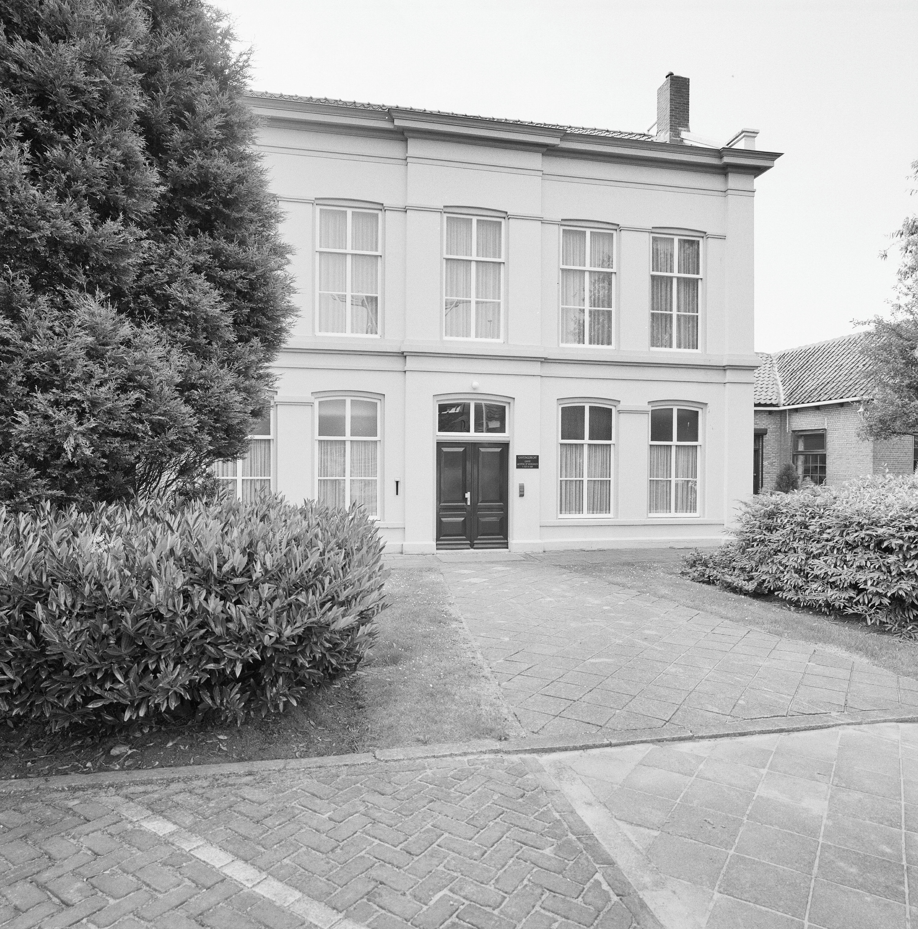 Kantongerecht: Overzicht voorgevel (opmerking: Gefotografeerd voor MIP Zuid-Holland, bladzijde 112)